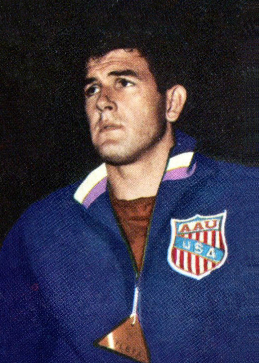 CAMPIONI DELLO SPORT 1969/70-n. 74 - R. MATSON (USA) -ATLETICA L.